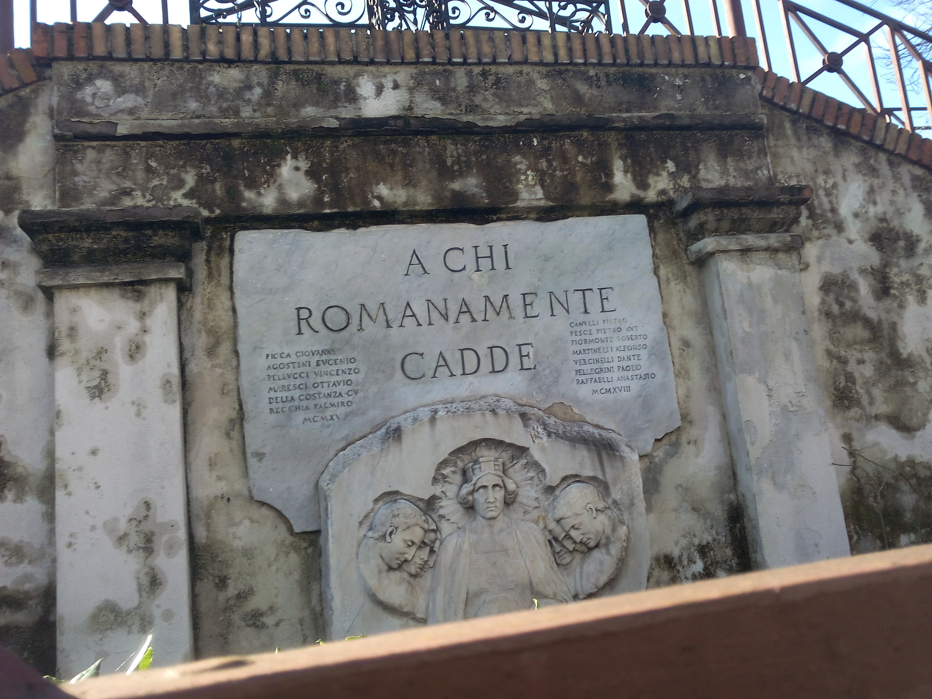 L'Associazione Culturale Visure Acatastali in visita al Quadraro l' 8 febbraio 2015 (foto G.P.)